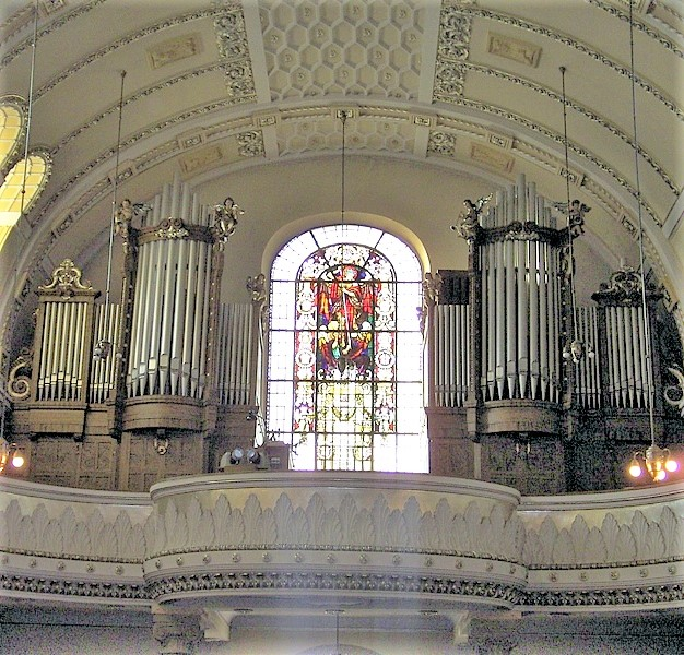 Orgel der Scheuerner Kirche